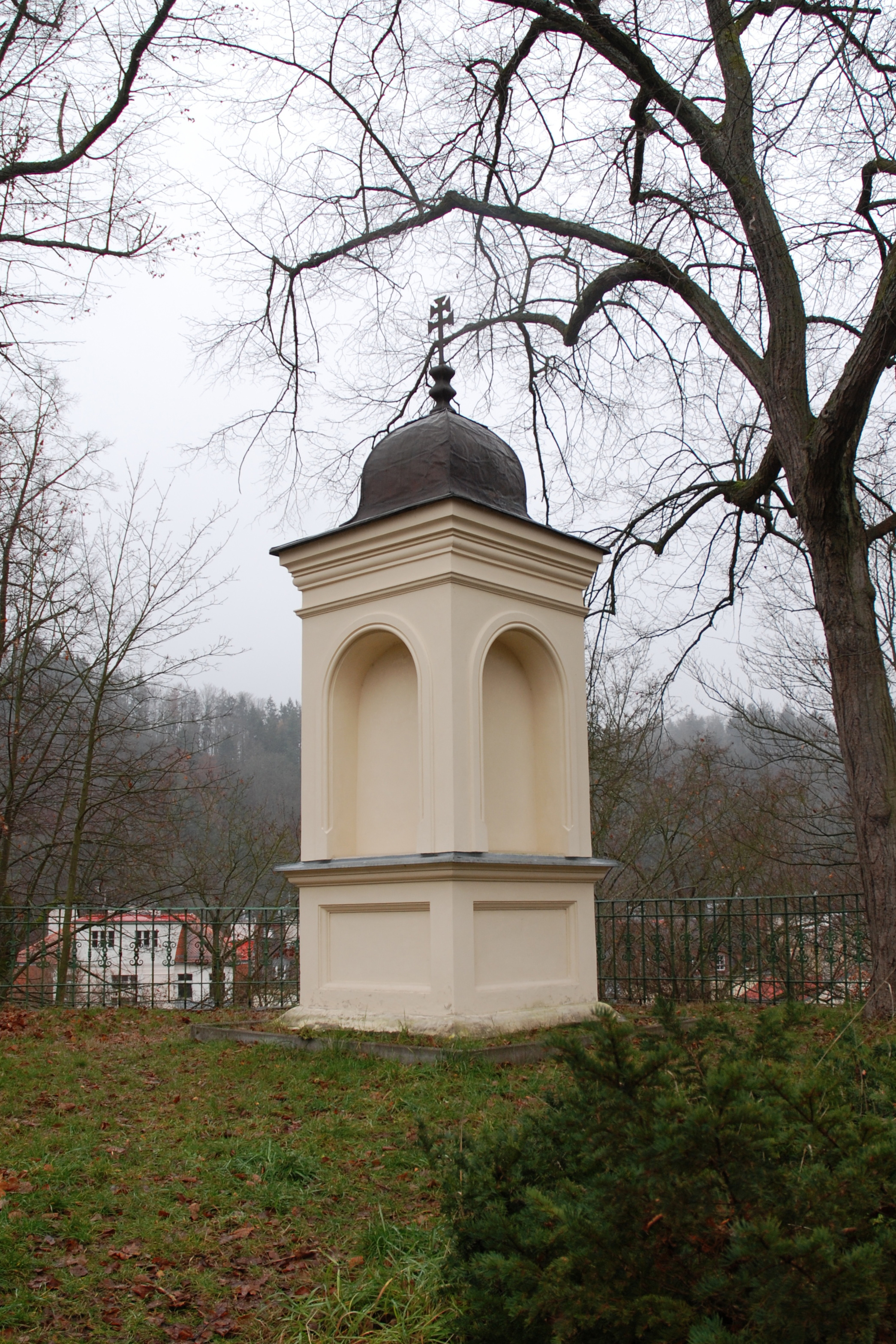 Kaple svatého Vavřince v Karlových Varech